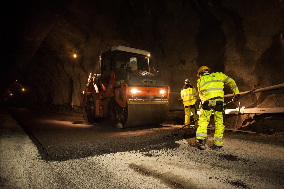 Lemminkäinen Norge AS produserer asfalt på 25 asfaltfabrikker plassert rundt i hele Norge for alle kjente anvendelsesområder av produktet